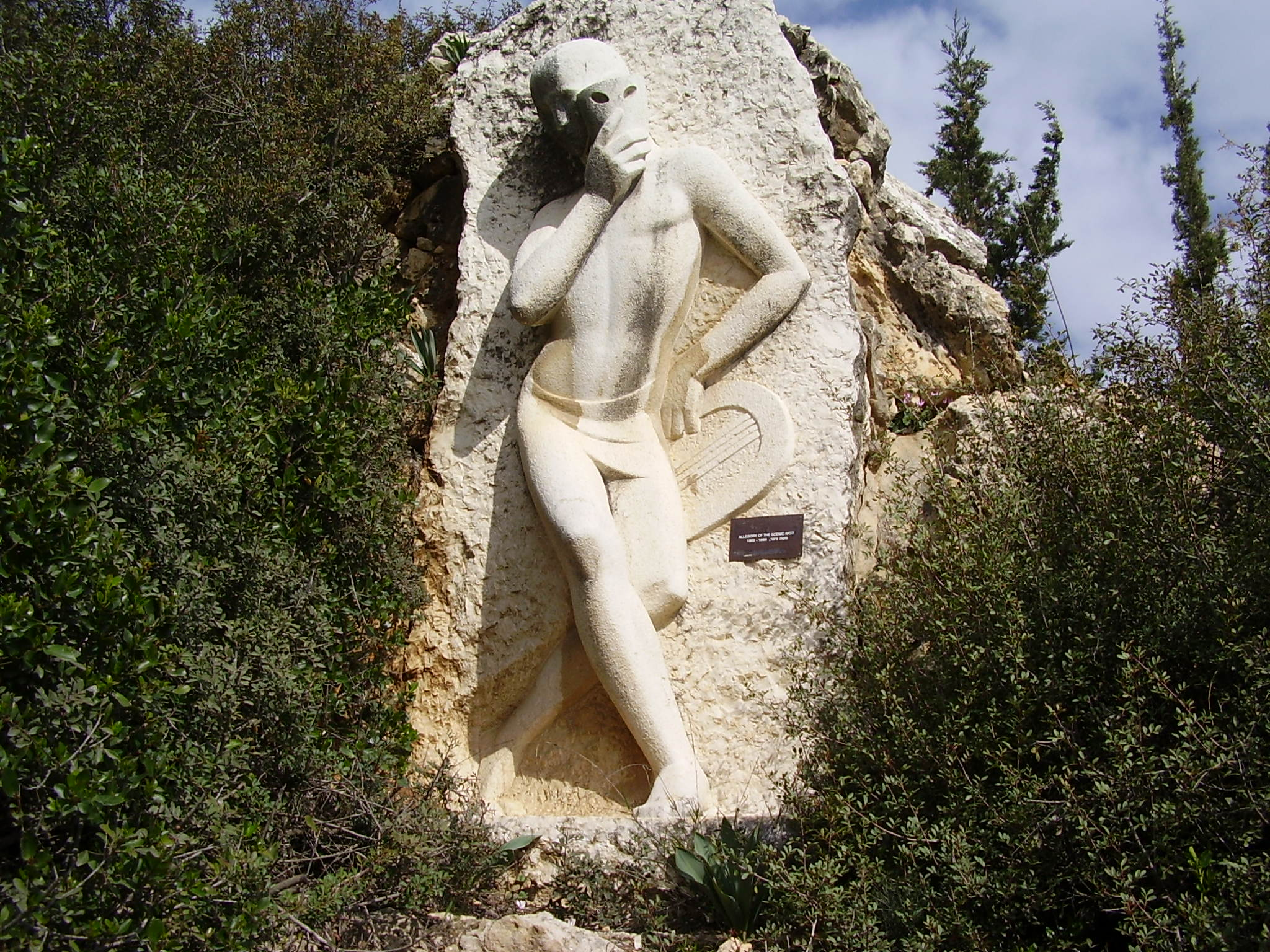 פסל של משה ציפר בקמפוס גבעת רם בירושלים רישיון נוצר על ידי משתמש:Avi1111